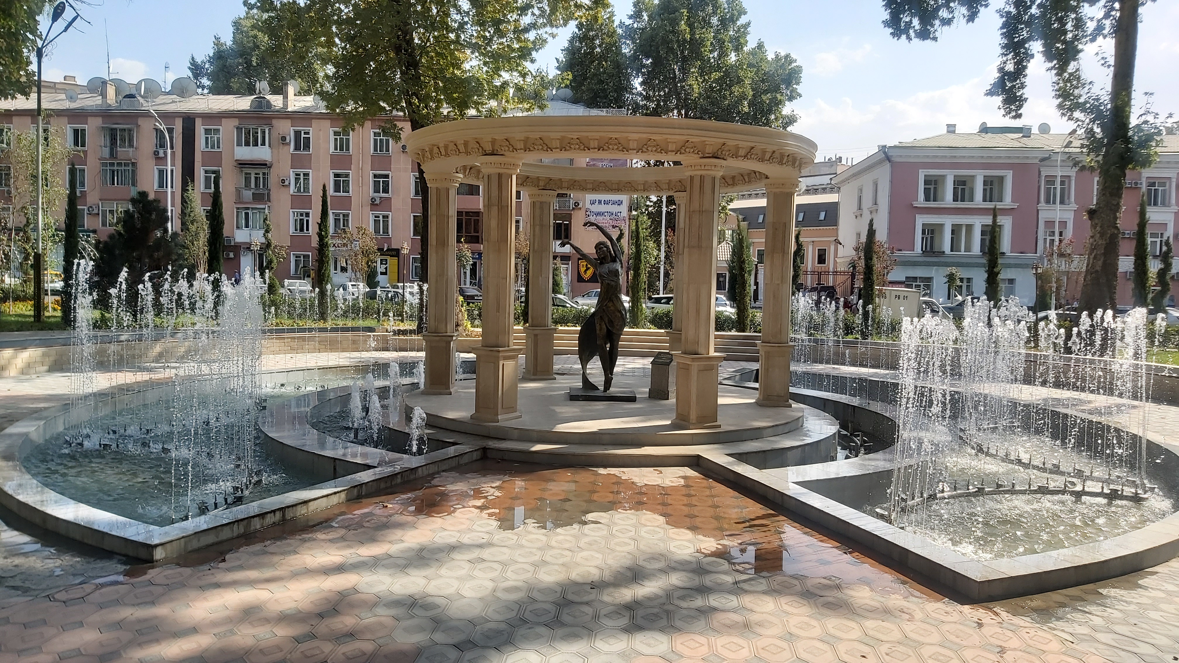 Памятник Сабировой в Душанбе